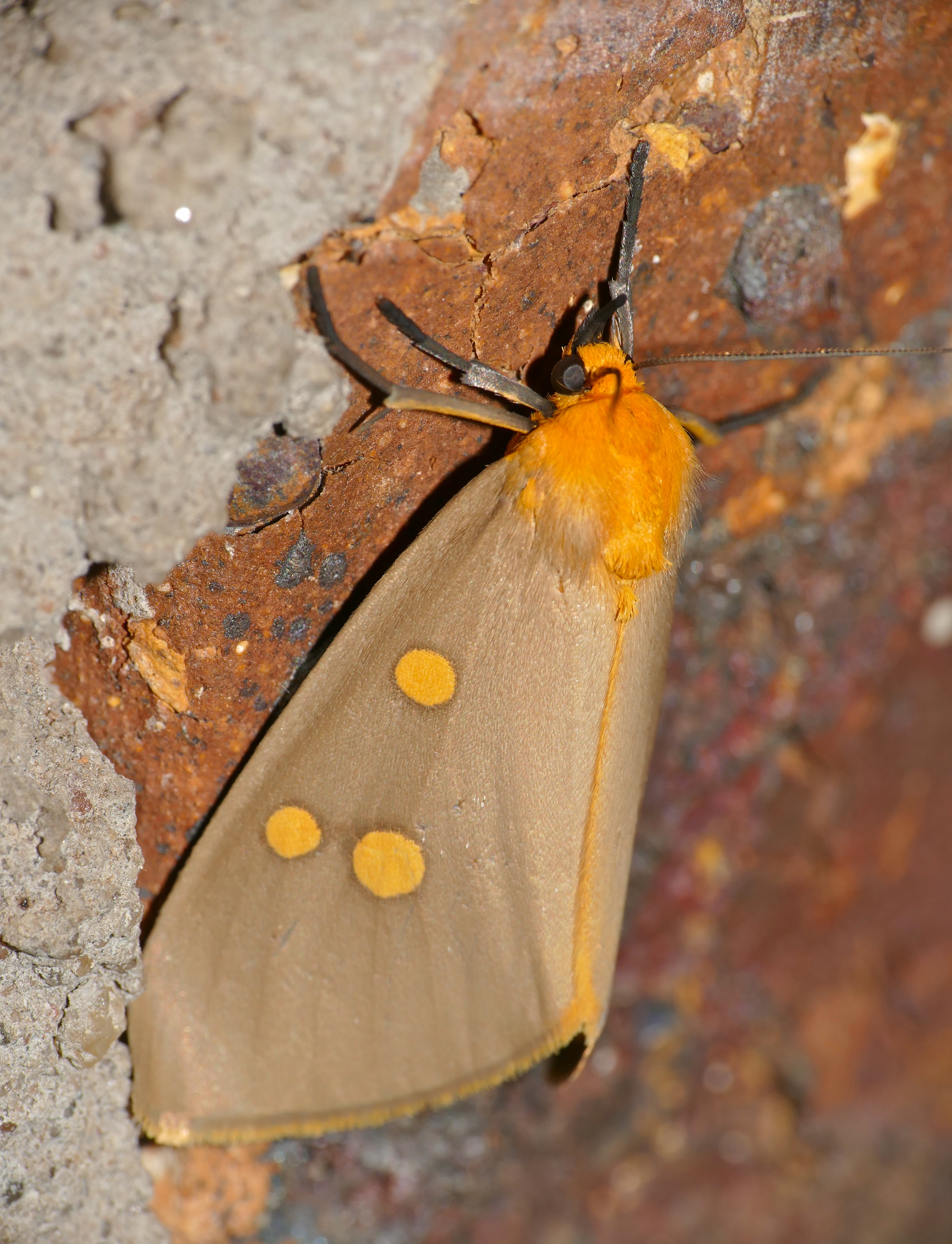 Berg-en-Dal Camp, Kruger NP, SOUTH AFRICA